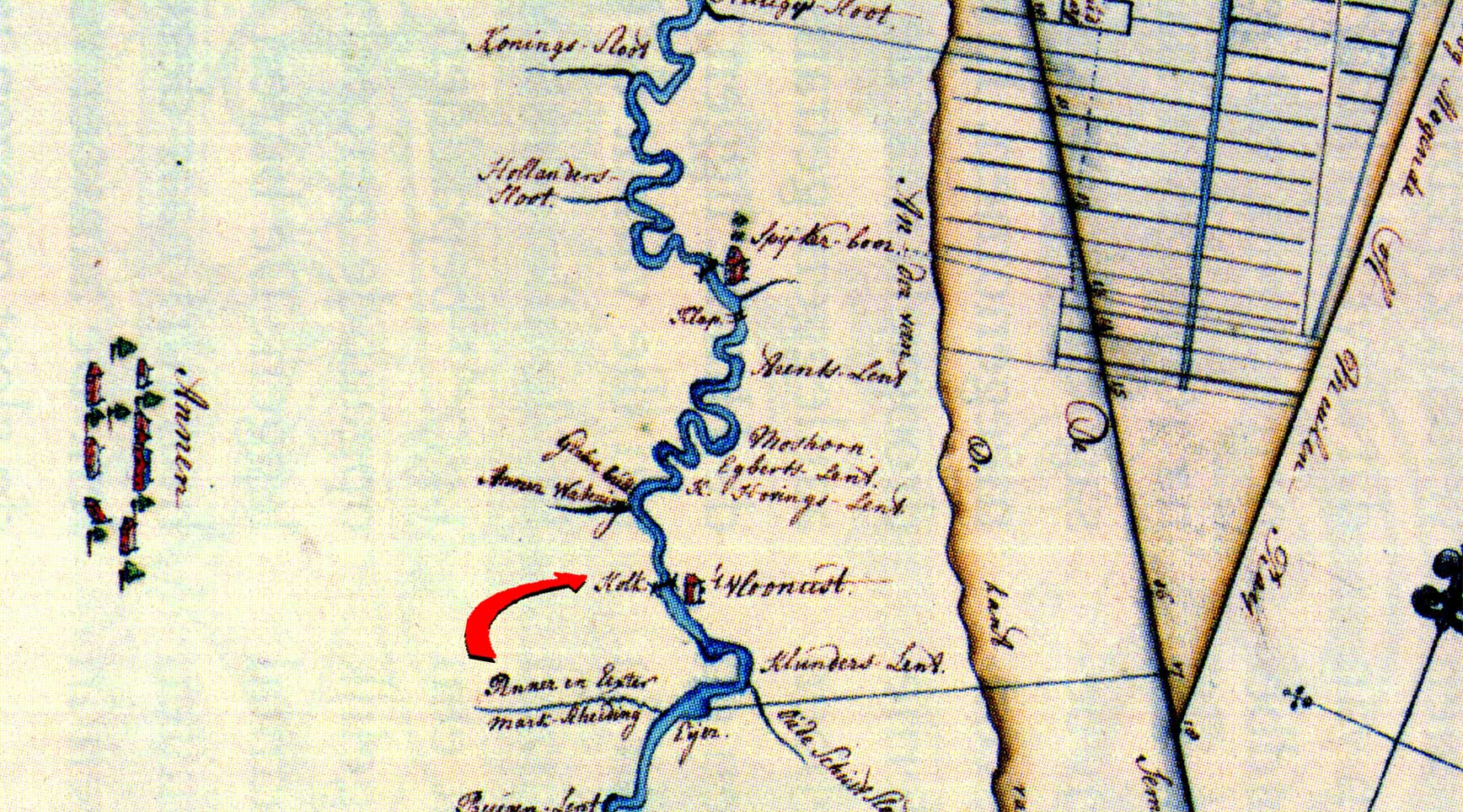 Detail van een kaart van de Hunze of Oostermoerse Vaart met de "'t Vloonust"